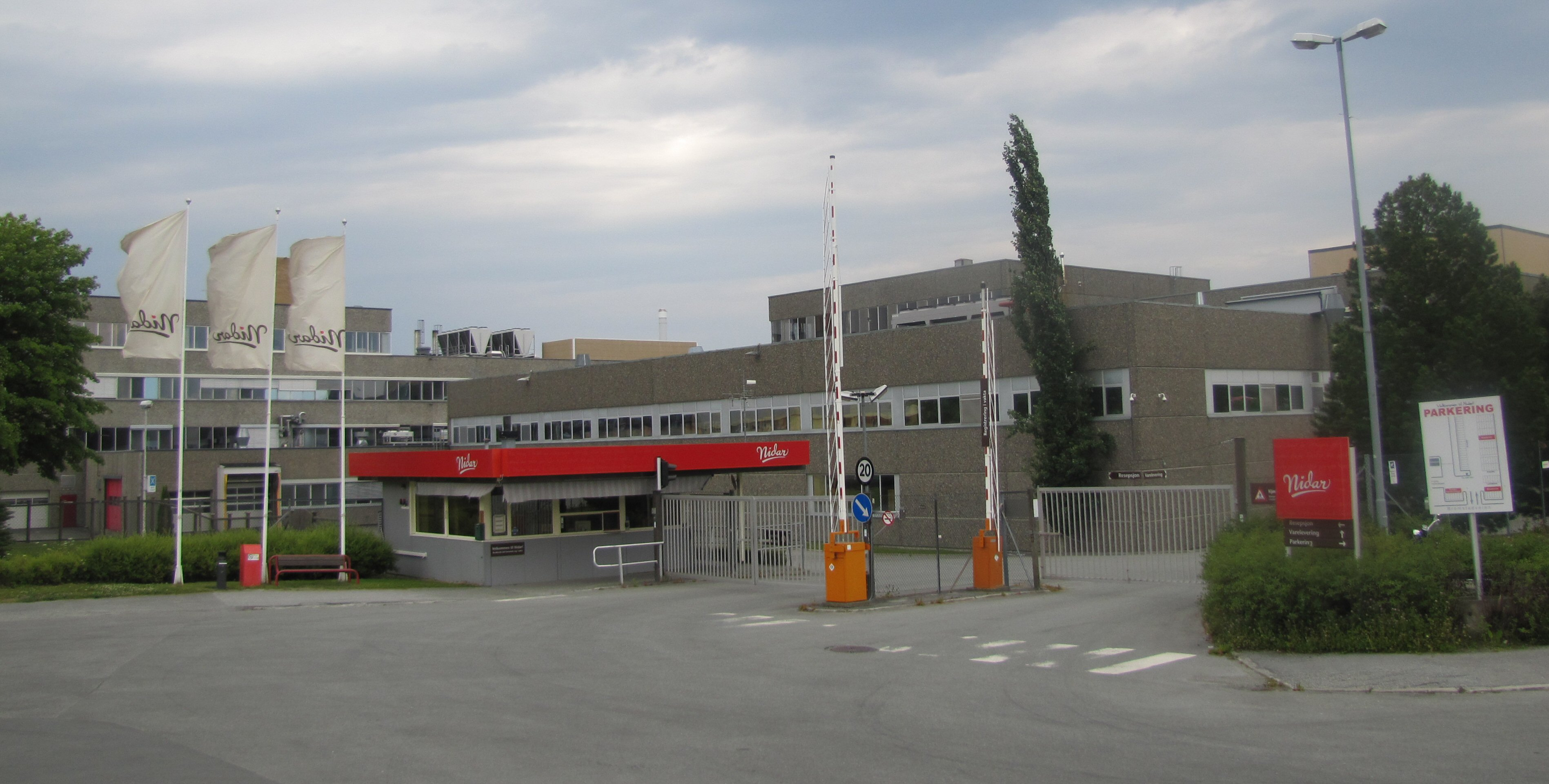 Nidar sjokoladefabrikk, Trondheim